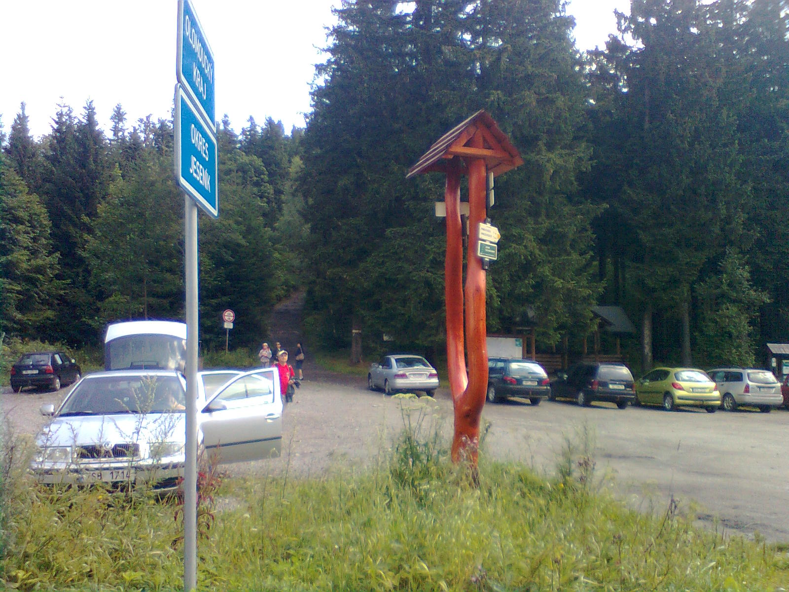 Widok na piesze wejście z przełęczy Petrovy boudy na Biskupią Kopę